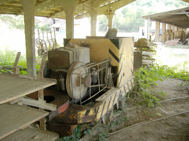 SD–9-es mozdony a villánykövesdi téglagyárban